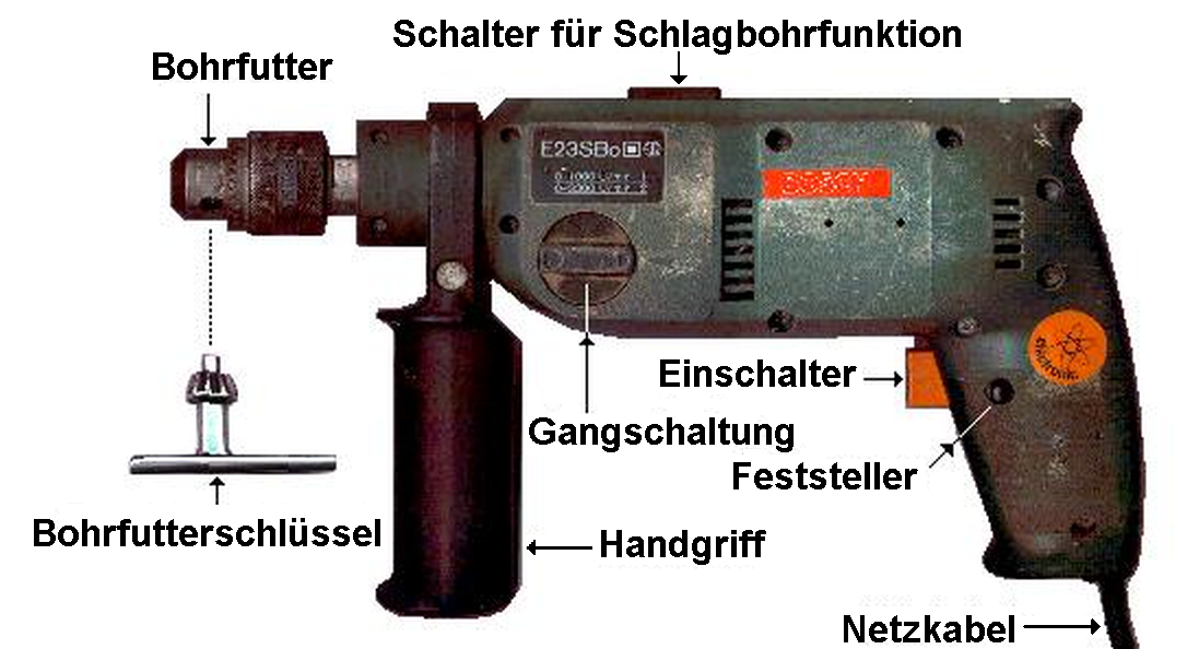 Abbildung einer elektrischen Handbohrmaschine GFDL aufgenommen von Honina 18:58, 10. Sep 2004 (CEST)